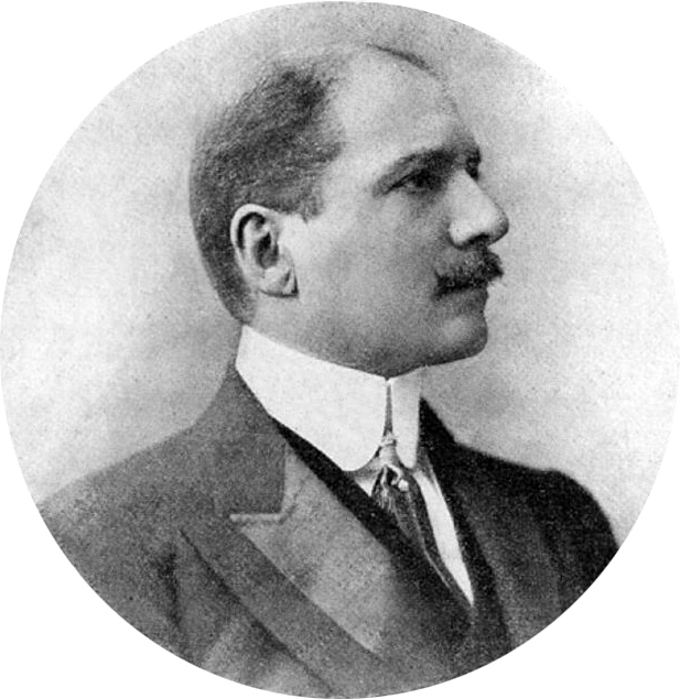 Luis Orrego Luco ( * Santiago, 18 de mayo de 1866 - † 3 de diciembre de 1948). Político, novelista y diplomático chileno.